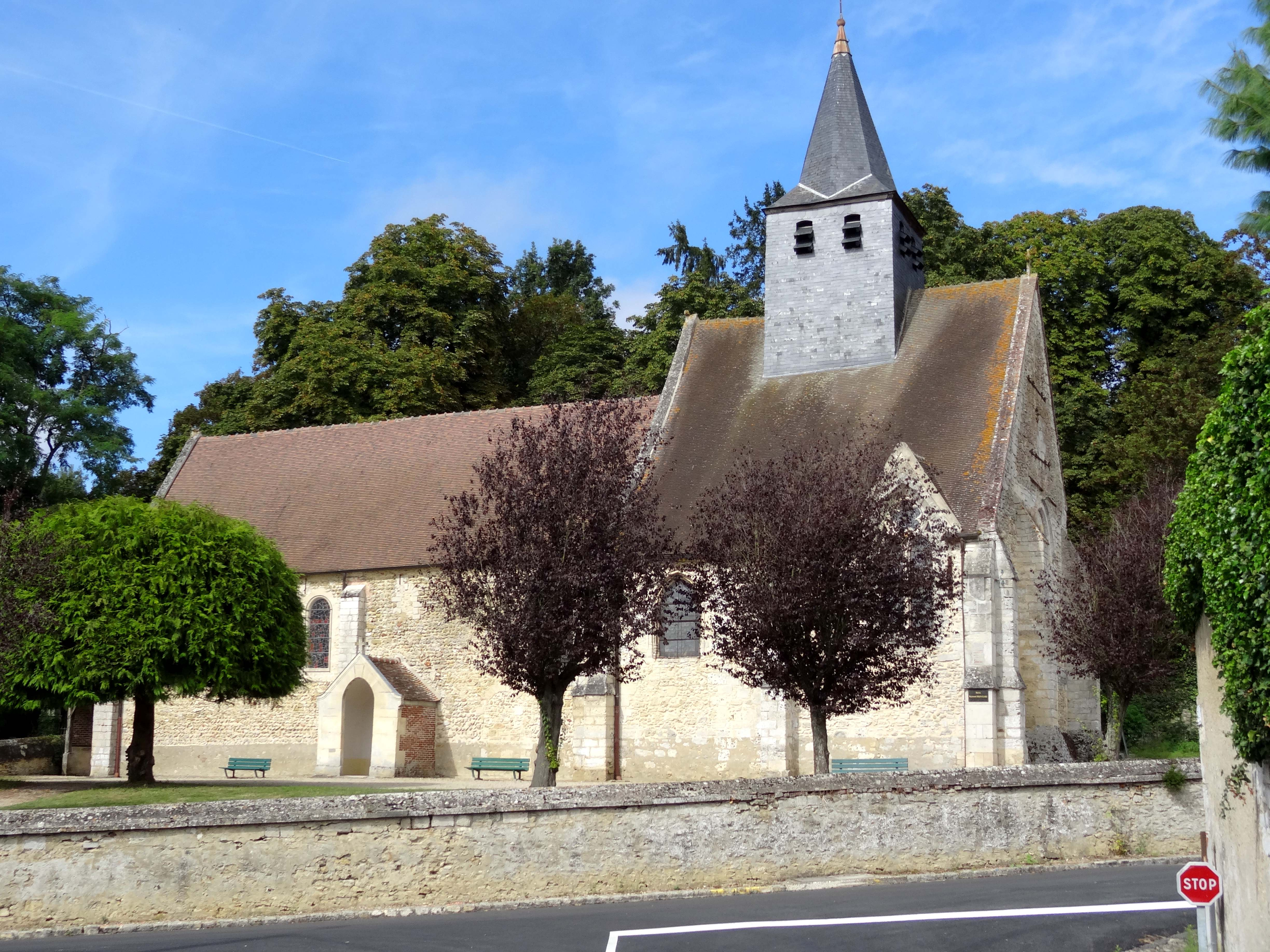 Église Saint-Remi de Ponchon - voir titre.